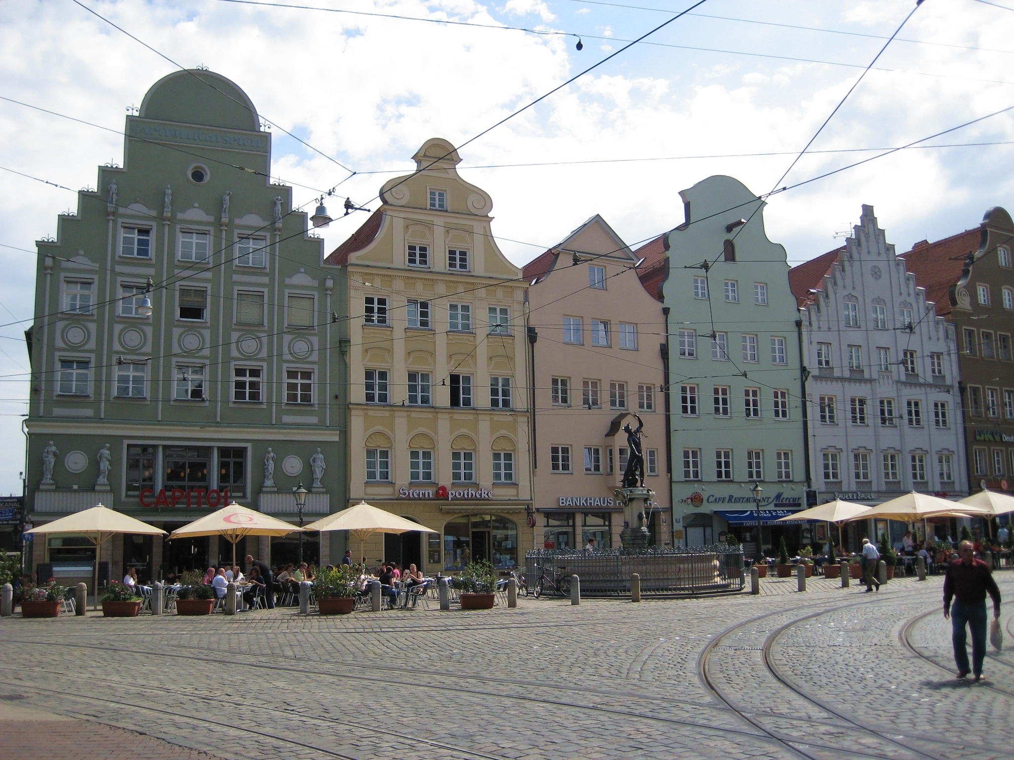 Blick vom Weberhaus/Ostende Moritzplatz auf die Maximilianstraße mit dem Merkurbrunnen